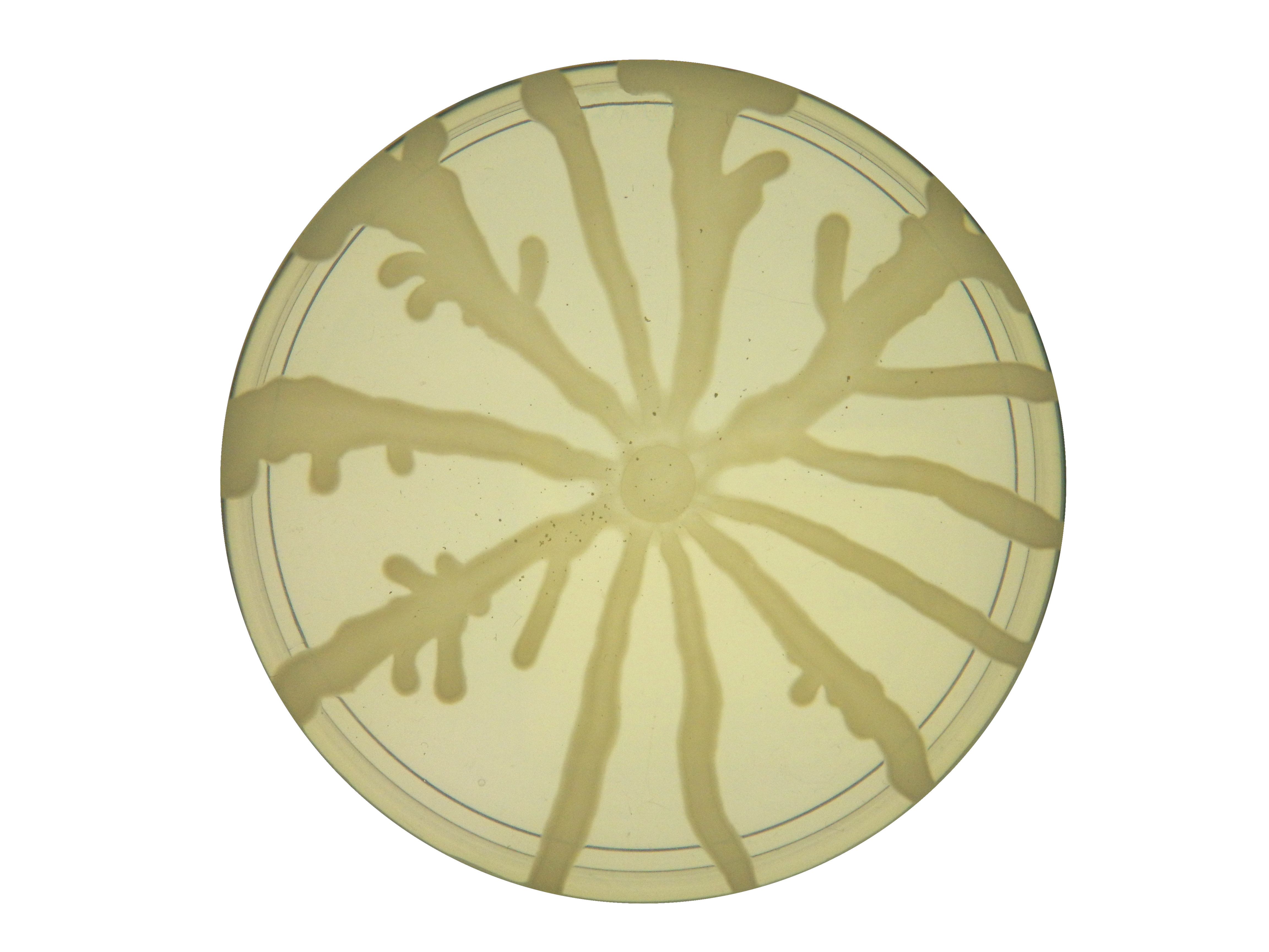 Motilidade do tipo swarming de Pseudomonas aeruginosa (cepa PA14) em meio semi-sólido. Tempo de crescimento foi de 48 horas.